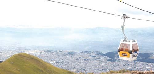 El teleférico de Quito es uno de los proyectos más ambiciosos emprendidos en los últimos años, una opción que además de agregar un atractivo turístico a la ciudad se convierte en uno de los más importantes y completos de Latinoamérica integrando a la capital en la dinámica de las grandes metrópolis de la región. Este mega proyecto que además del teleférico presenta alternativas de diversión y entretenimiento consta de 160 hectáreas. El viaje en teleférico es una experiencia inolvidable ya que parte desde las faldas del Pichincha a la altura de La Gasca a 2.950 metros de altura y sube una distancia en línea recta de 2.500 metros lineales arribando a Cruz Loma a 4.050 metros de altura. Durante el trayecto de alrededor de ocho minutos se puede apreciar todo el esplendor de la ciudad de Quito, sus hermosos paisajes y el crecimiento urbanístico que ha tenido la misma. 18 cabinas con una medida de 1,60 metros de ancho por 2 de alto, elaboradas en acrílico polarizado, con capacidad para seis personas, son las encargadas de llevar a los visitantes en este viaje especial y lleno de emoción. Las cabinas saldrán en forma indefinida con una separación de 300 metros entre cada una para que los visitantes accedan de una forma rápida a este nuevo atractivo de la ciudad.